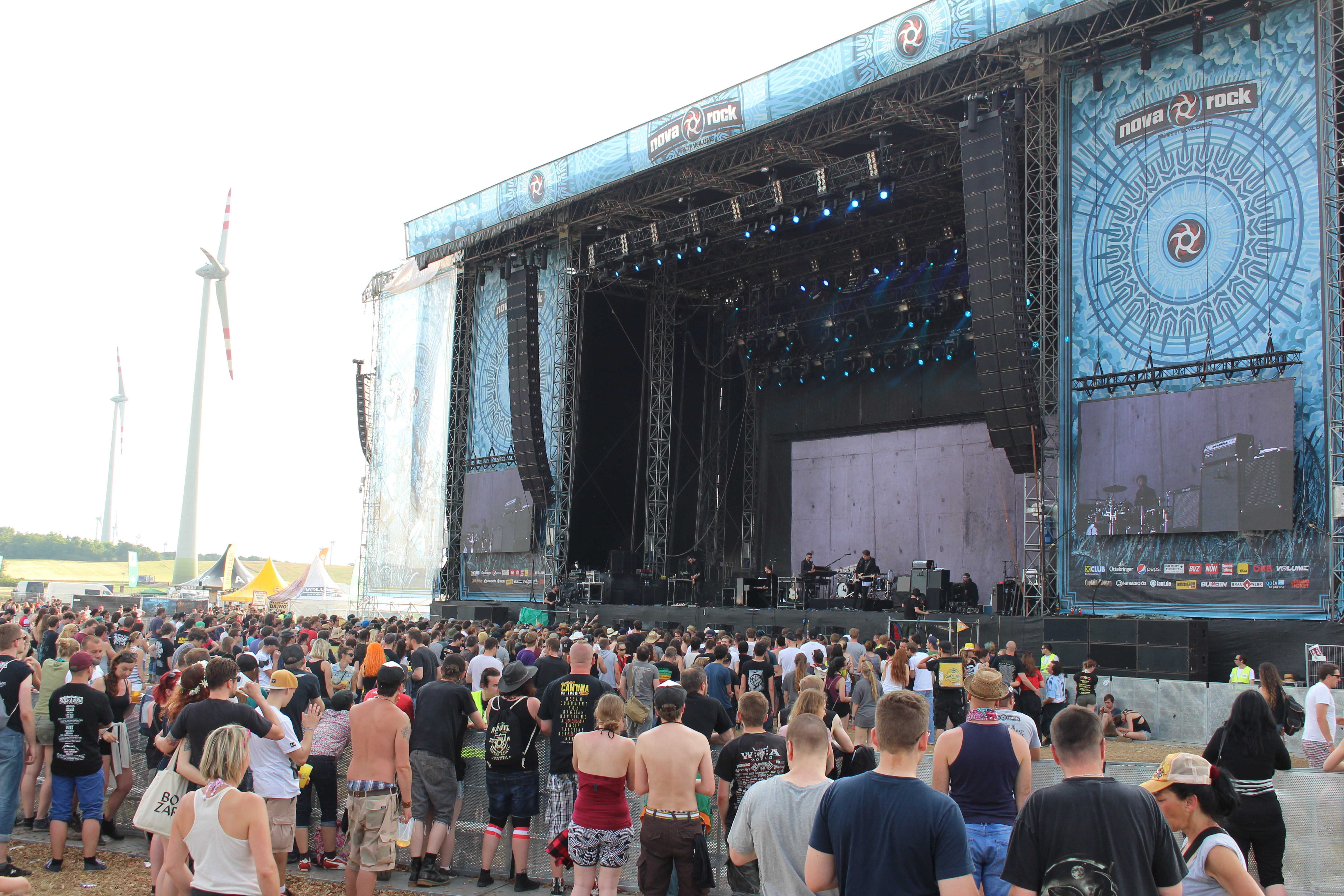 Festivalsommer This photo was created with the support of donations to Wikimedia Deutschland in the context of the CPB project "Festival Summer". Personality rights warningAlthough this work is freely licensed or in the public domain, the person(s) shown may have rights that legally restrict certain re-uses unless those depicted consent to such uses. In these cases, a model release or other evidence of consent could protect you from infringement claims.